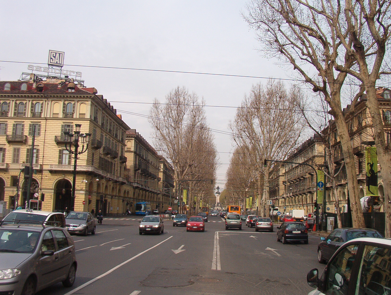 corso Vittorio Emanuele II - Torino - Italia